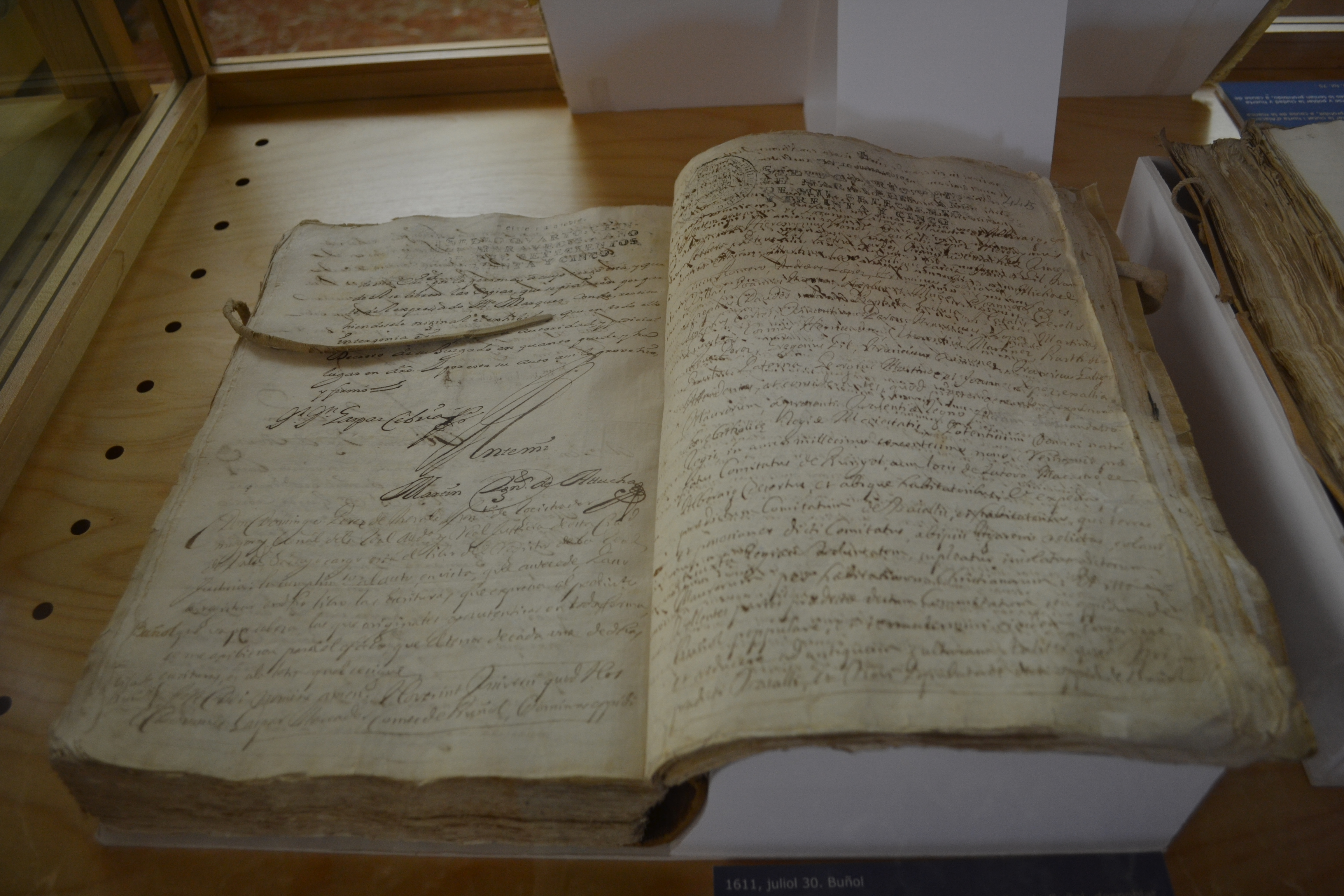 En Gaspar Mercader atorga carta pobla al lloc de Bunyol, despoblat per l'expulsió dels moriscos, per a 38 pobladors a fur de València (30 de juliol de 1611). ARV: Reial Justícia, llibre 793, fol. 444v (còpia de 25 de juliol de 1735). Arxiu del Regne de València.